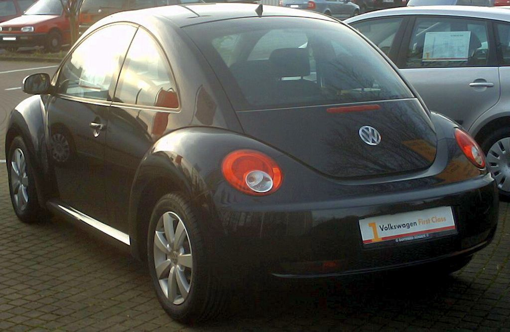 VW New Beetle